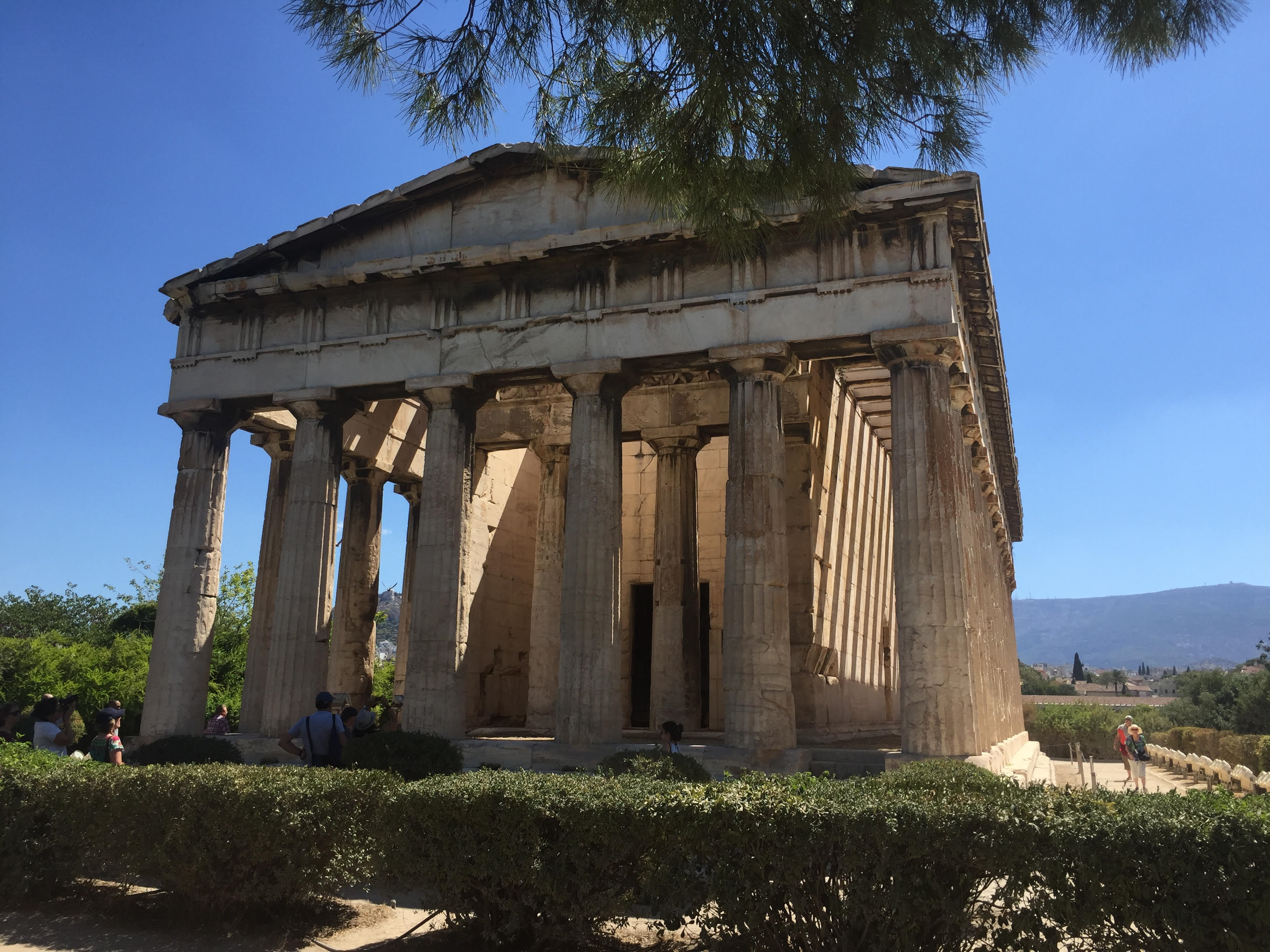 «άγνωστο»